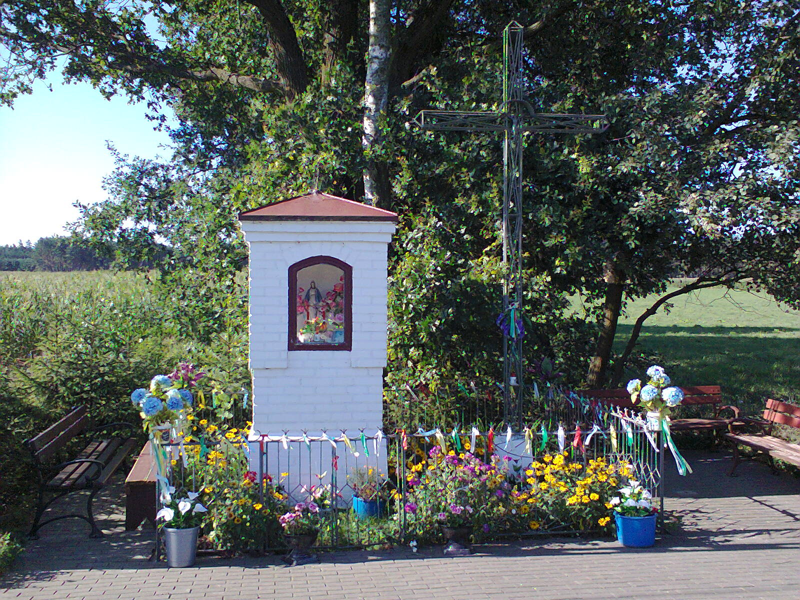 Kapliczka w Gralach (powiat ostrołęcki).